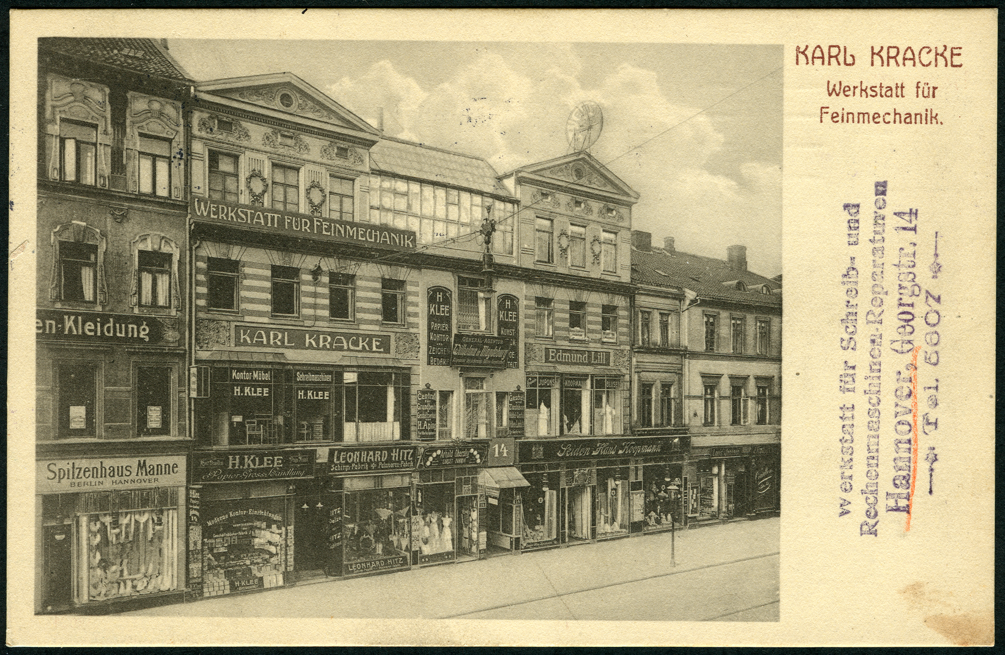 Von Edmund Lill für den Unternehmer Karl Kracke produzuierte Ansichtskarte mit einem Blick etwa um die Zeit von 1910 auf die Häuser (von rechts) Georgstraße 13, 14 und 15. Im Ergeschoss von Haus Nummer 13 findet sich das Ladengeschäft der Tee-, Schokolade- & Delikatessen-Handlung Louis Janssen. In der Bildmitte das Haus Nummer 14 mit der Seidenhandlung Koopmann, dem Foto-Atelier des Ansichtskartenherausgebers und Architektur-Fotografen Edmund Lill, der im verglasten Dachgeschoss bei maximalem Tageslicht wohl abertausende von Foto-Aufnahmen fertigstellte. Weiter links im Erdgeschoss die Corsett-Fabrik Arnold Obersky, darüber die Schilder der Centrale für Grundbesitz und Geschäftsverkäufe von H. Aping, der neben Geschäfts- und Zinshäusern, Hotels und Gaststätten auch Villen und Landsitze an- und verkaufte. Im Zweiten Stock findet sich die Reklame des Büro- und Geschäftshaus-Ausstatters Heinrich Klee, Papierkontor und Zeichenbedarf sowie Kunst-Druck-Präge-Anstalt, Kontor-Möbel und Schreibmaschinen. Auch ein Hinweis auf die Generalagentur Wilhelma in Magdeburg, Allgemeine Versicherungs-Aktien-Gesellschaft fehlt nicht. Karl Kracke betriebe zunächst eine Werkstatt für Feinmechanik. Sein mit der Hand seitlich aufgebrachter Stempelabdruck hab dann aber die Dienste seiner Werkstatt für Schreib- und Rechenmaschinen hervor. Im Erdgeschoss von Haus Nummer 15 (ganz links) ist zumindest das Spitzenhaus Manne mit Sitz in Berlin und Hannover erkennbar ...